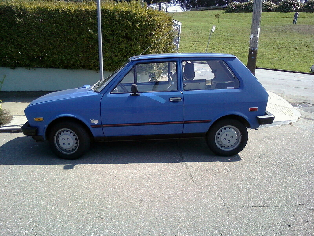 Blue Yugo GV in San Francisco.